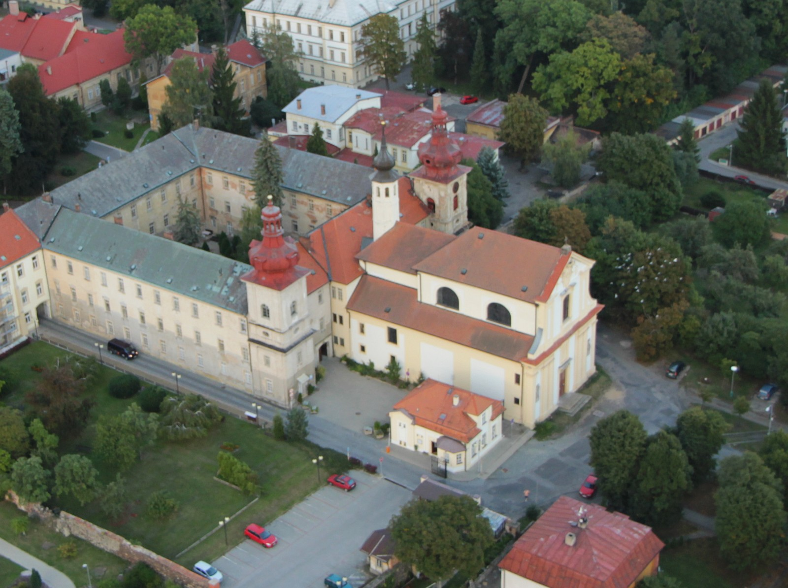 Klášter piaristický (Kosmonosy), Lípy 15, Kosmonosy